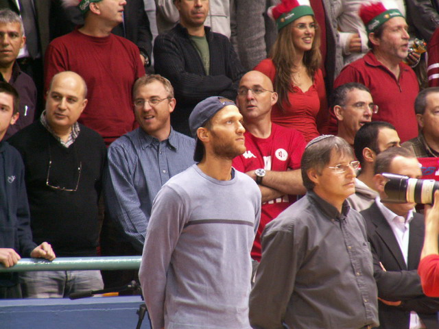 דורון שפר, בזמן ההמנון, מלחה, בינואר 2004